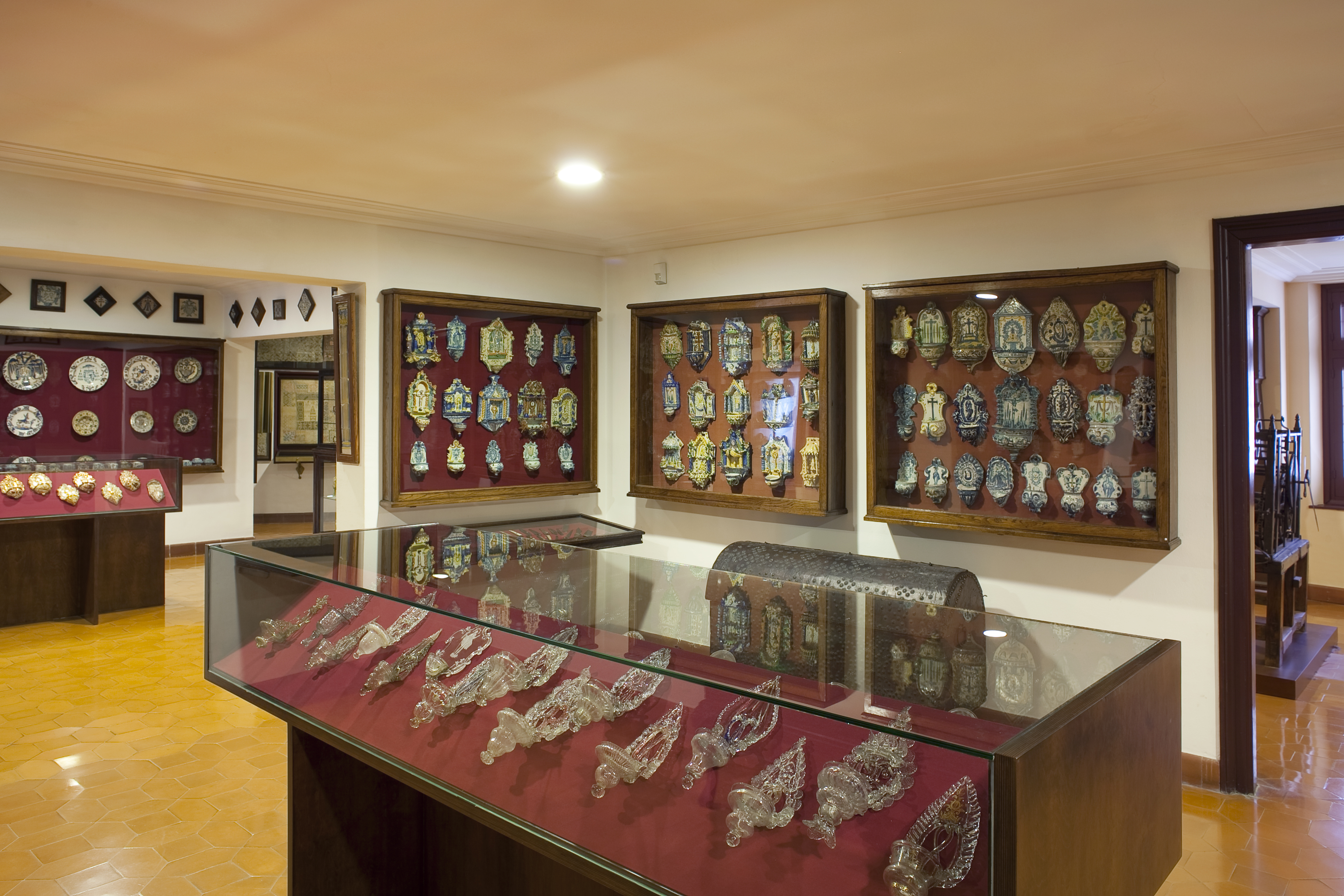 Aigua beneïda Gabinet col·leccionsta - Fot. GUILLEM F-H.jpg